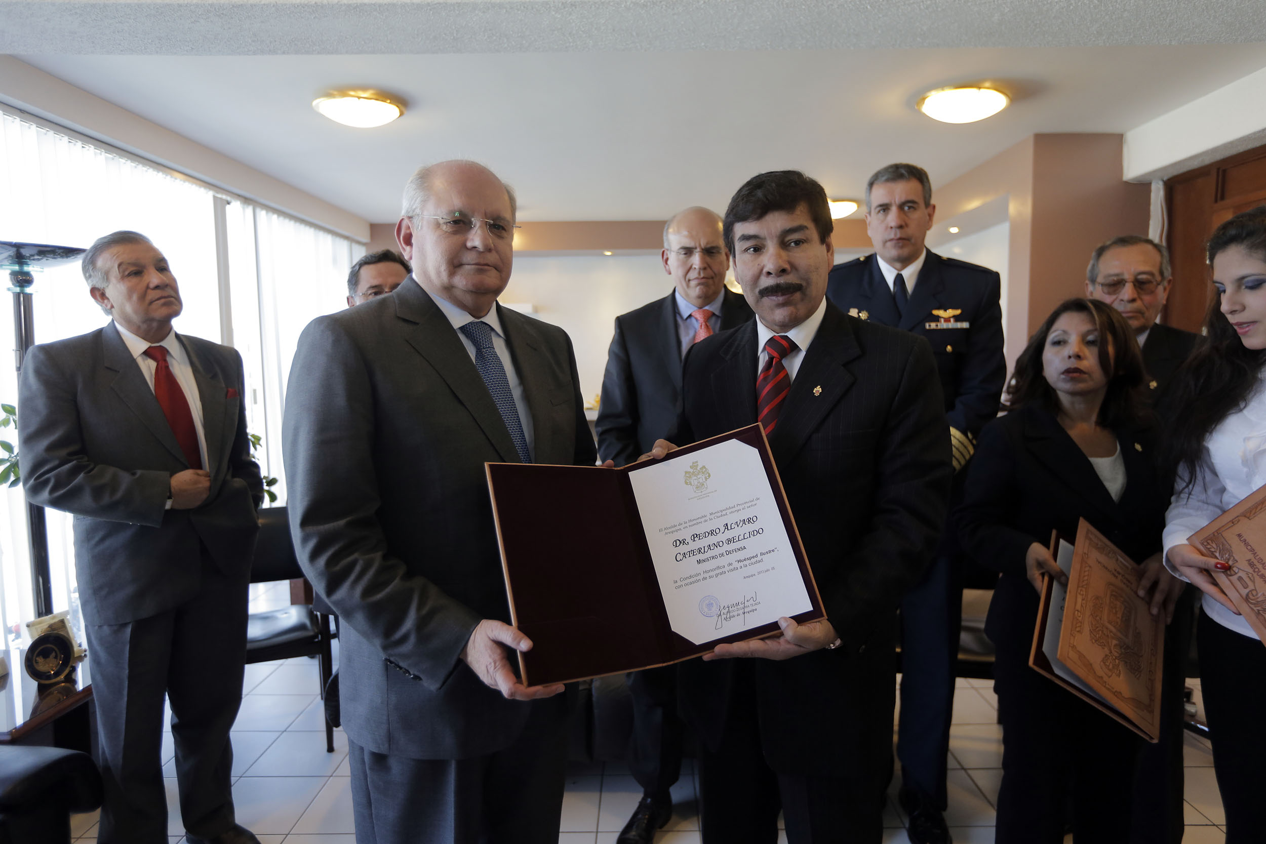 Reunión del ministro de Defensa, Pedro Cateriano Bellido, con el alcalde de Arequipa, Alfredo Zegarra Tejada.